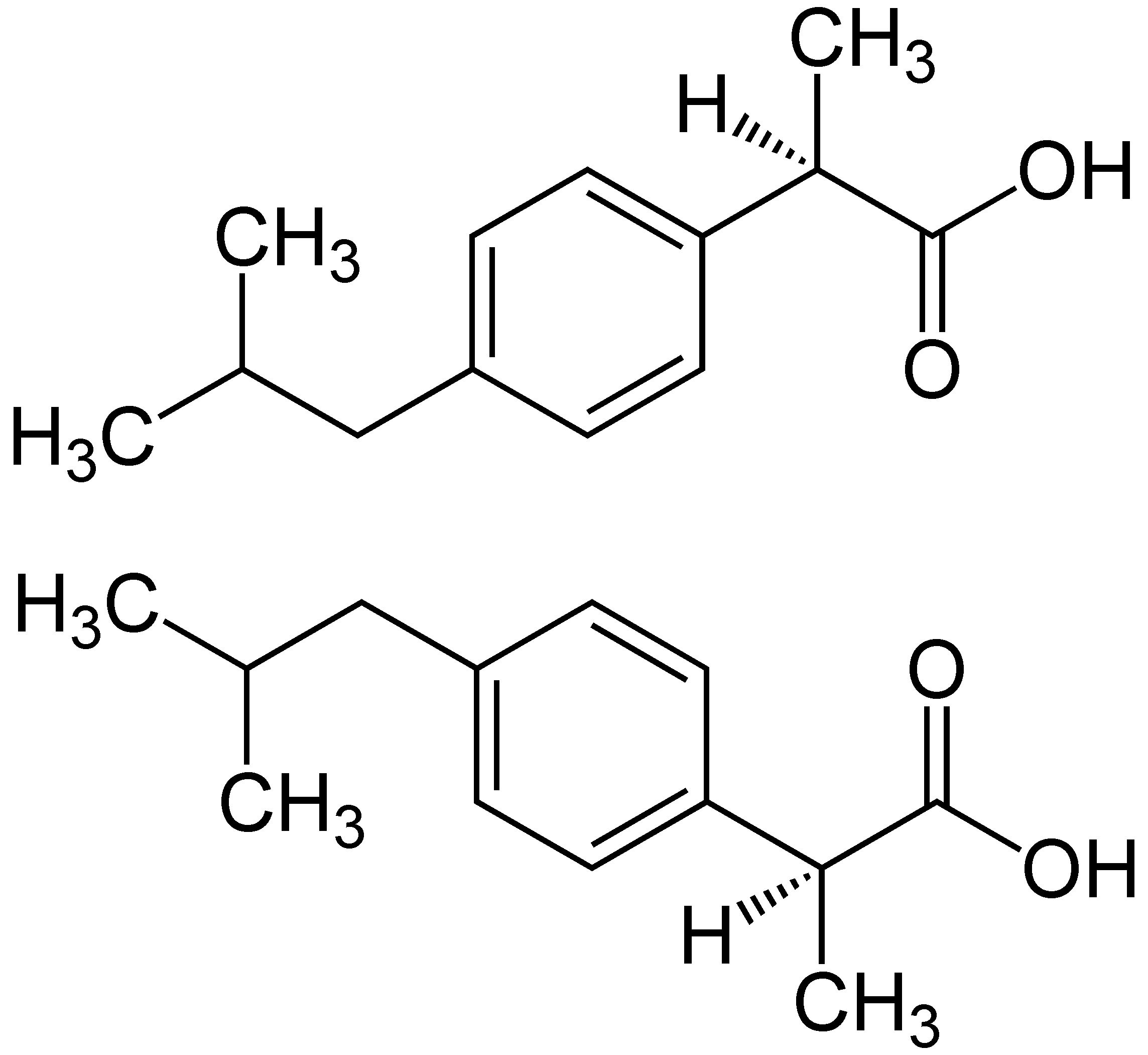 Ibuprofen ist ein Racemat